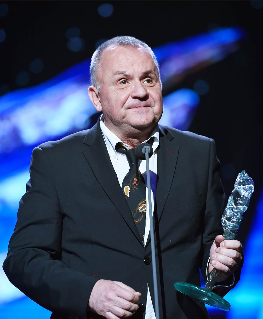 Jožo Ráž, Krištálové krídlo 2015.